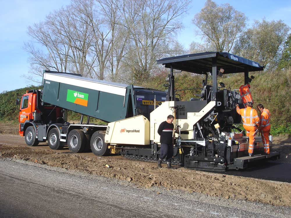 Straßenfertiger ABG 5820